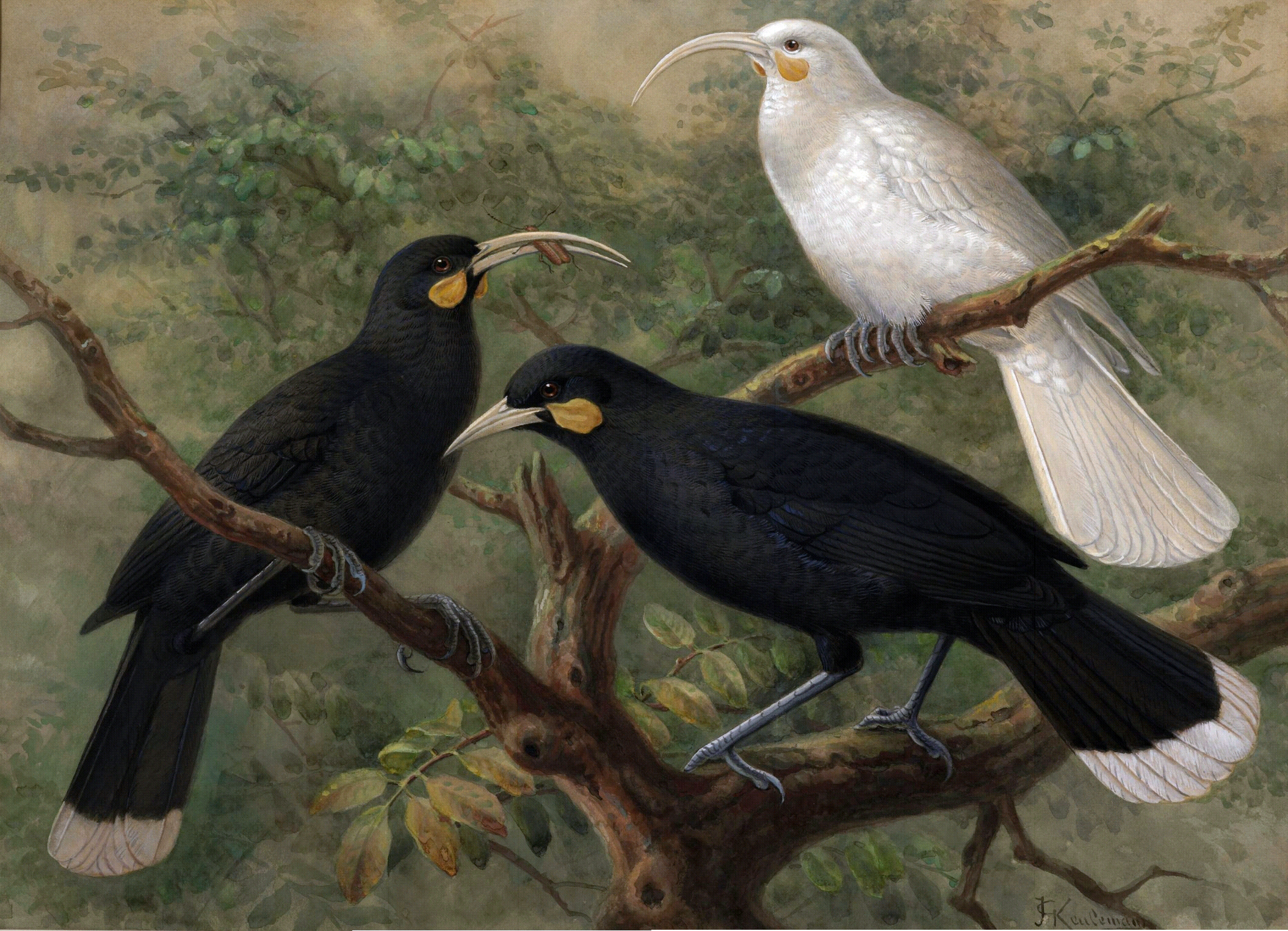 Huia, "Heteralocha acutirostris."